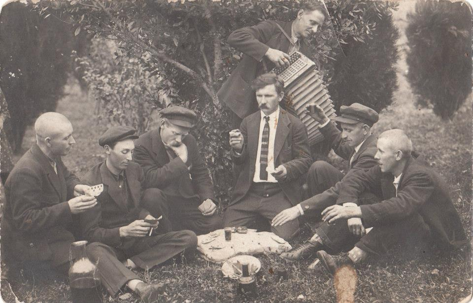 Pisike pidu Sulevi külas Abhaasias u 1920. a.